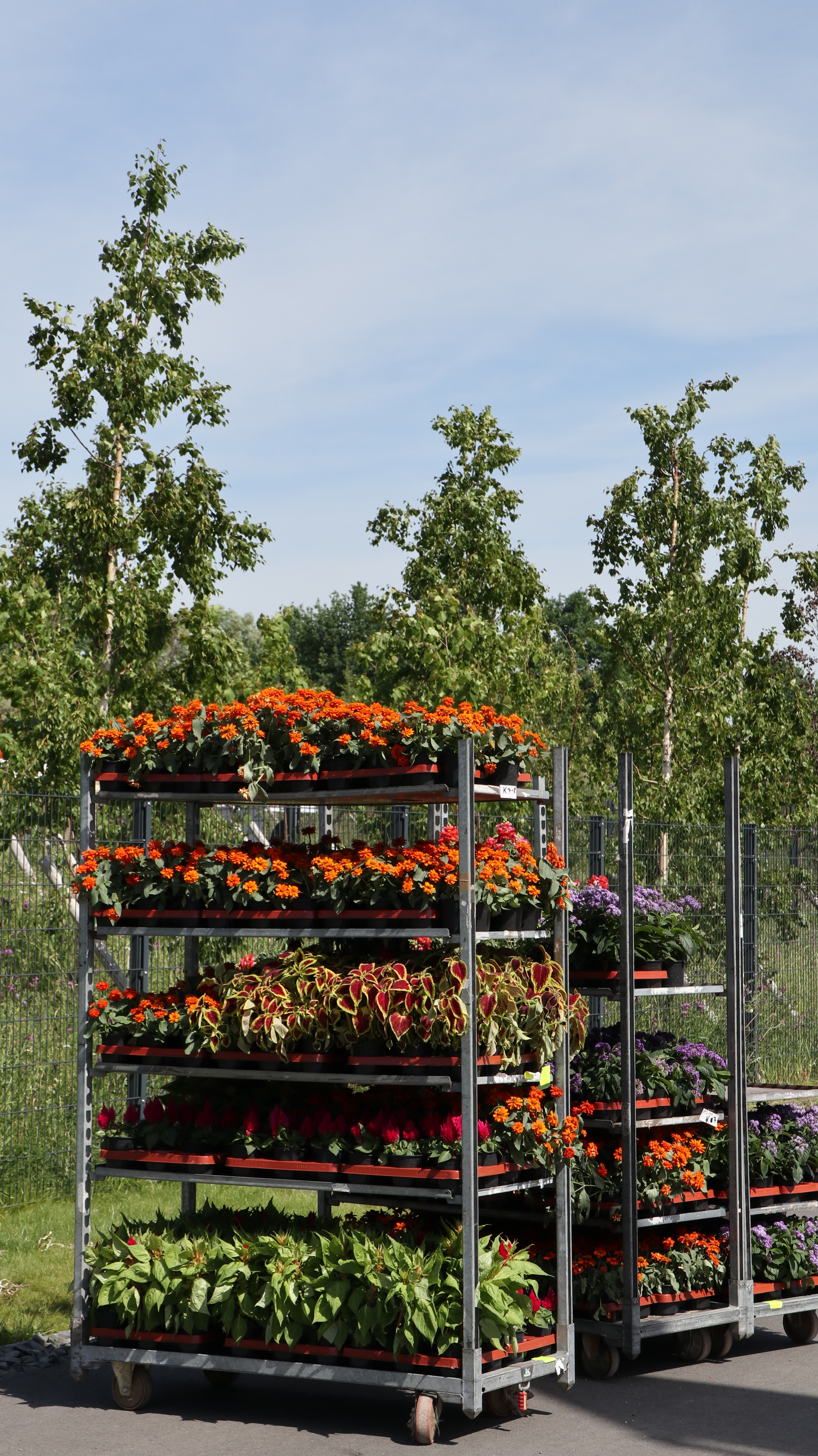 Blumen für die Sommerpflanzung der bunten Beete